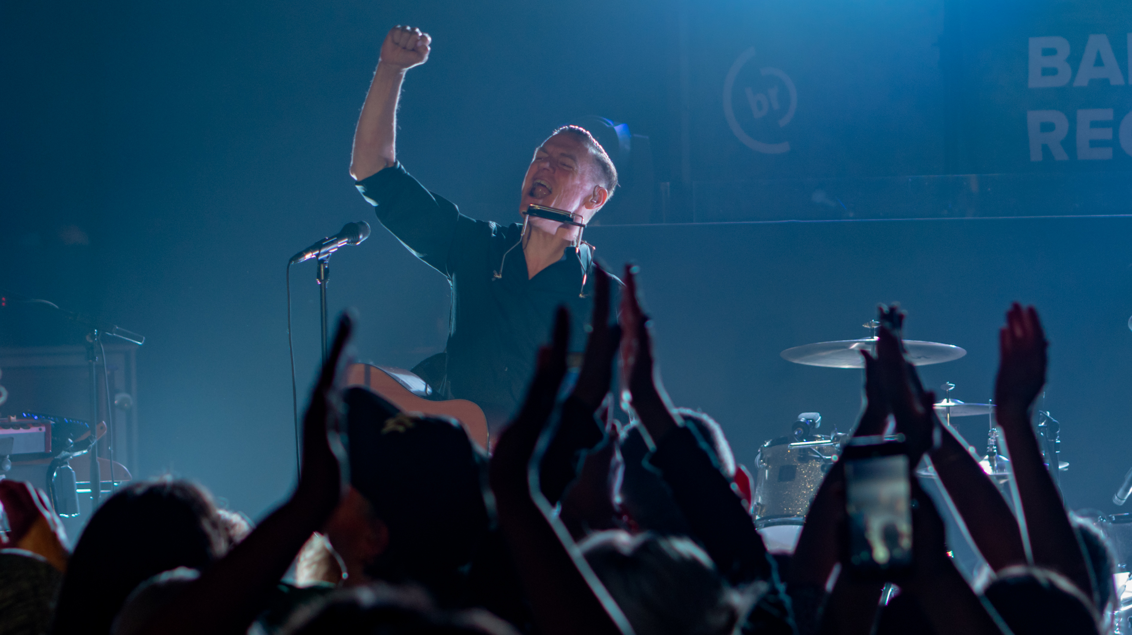 BryAdamsPryzm040319-28